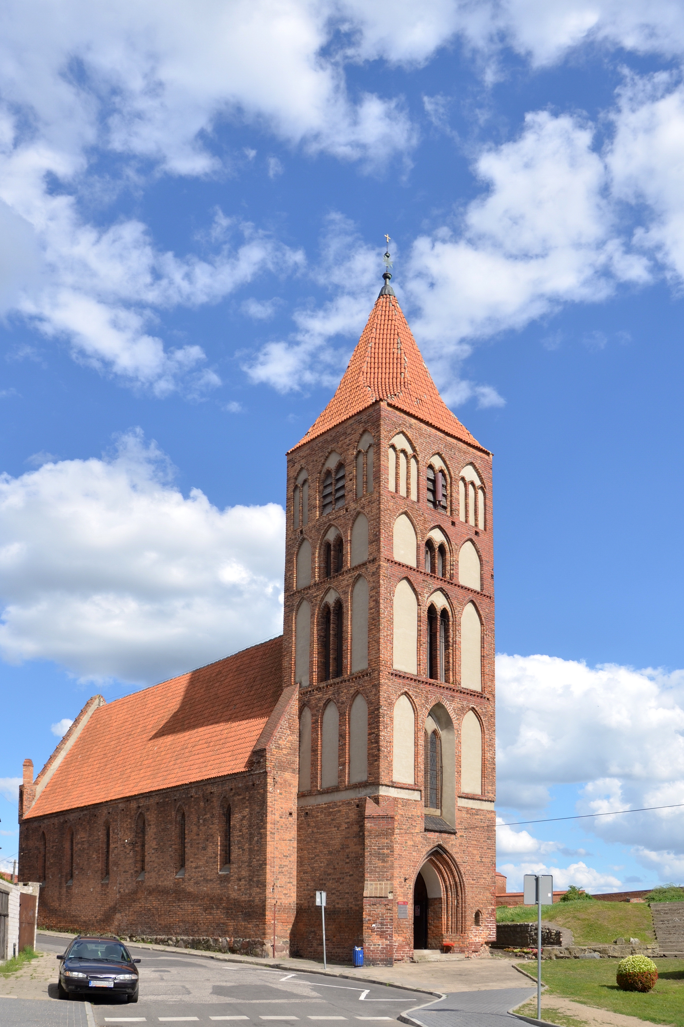 Chełmno, kościół fil. pw. św. Ducha, XIII/XIV